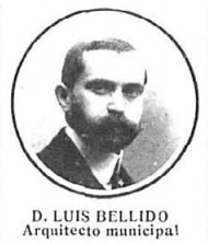 Retrato de Luis Bellido.